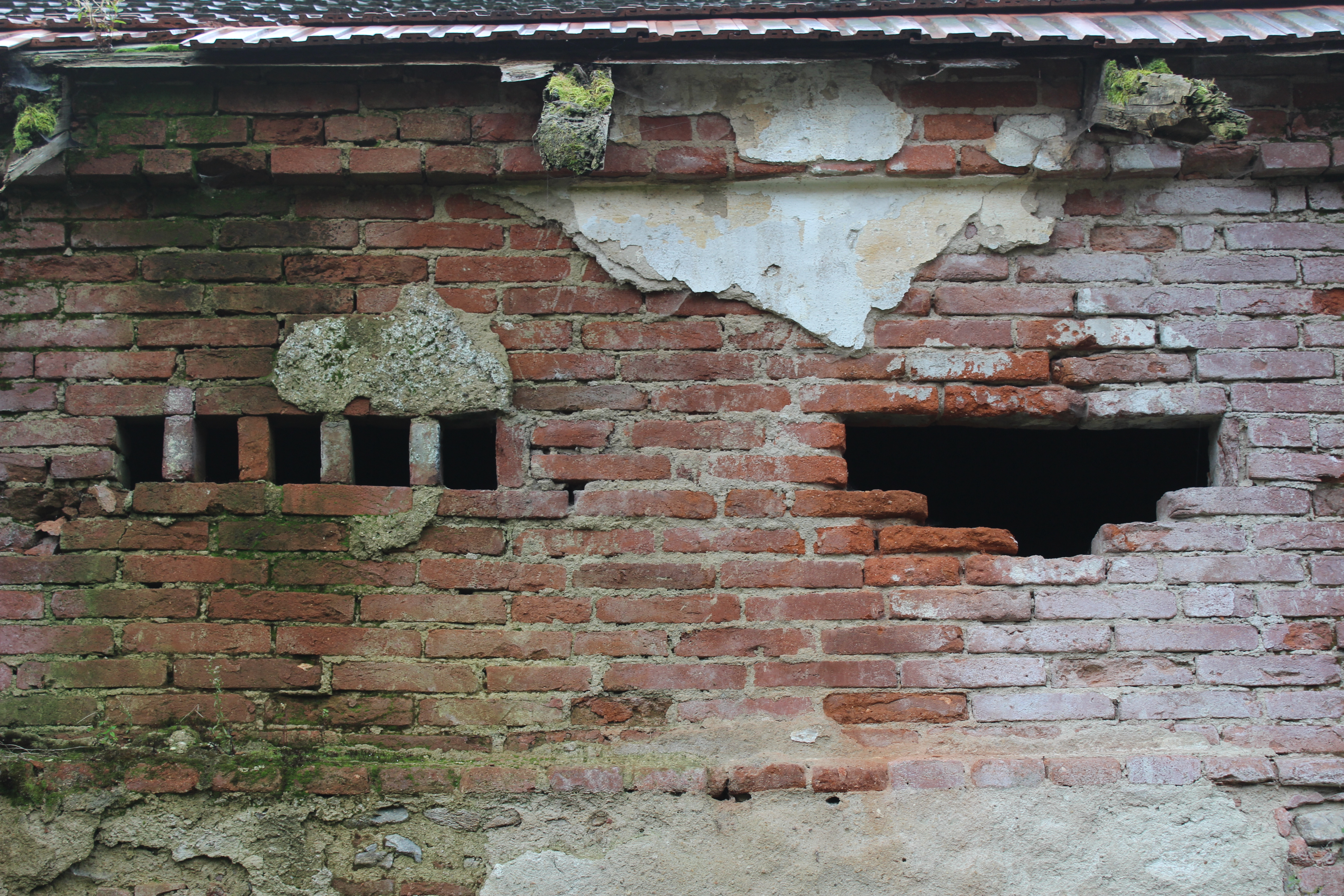 Nadezdění a větrací otvory severní stěny stodoly